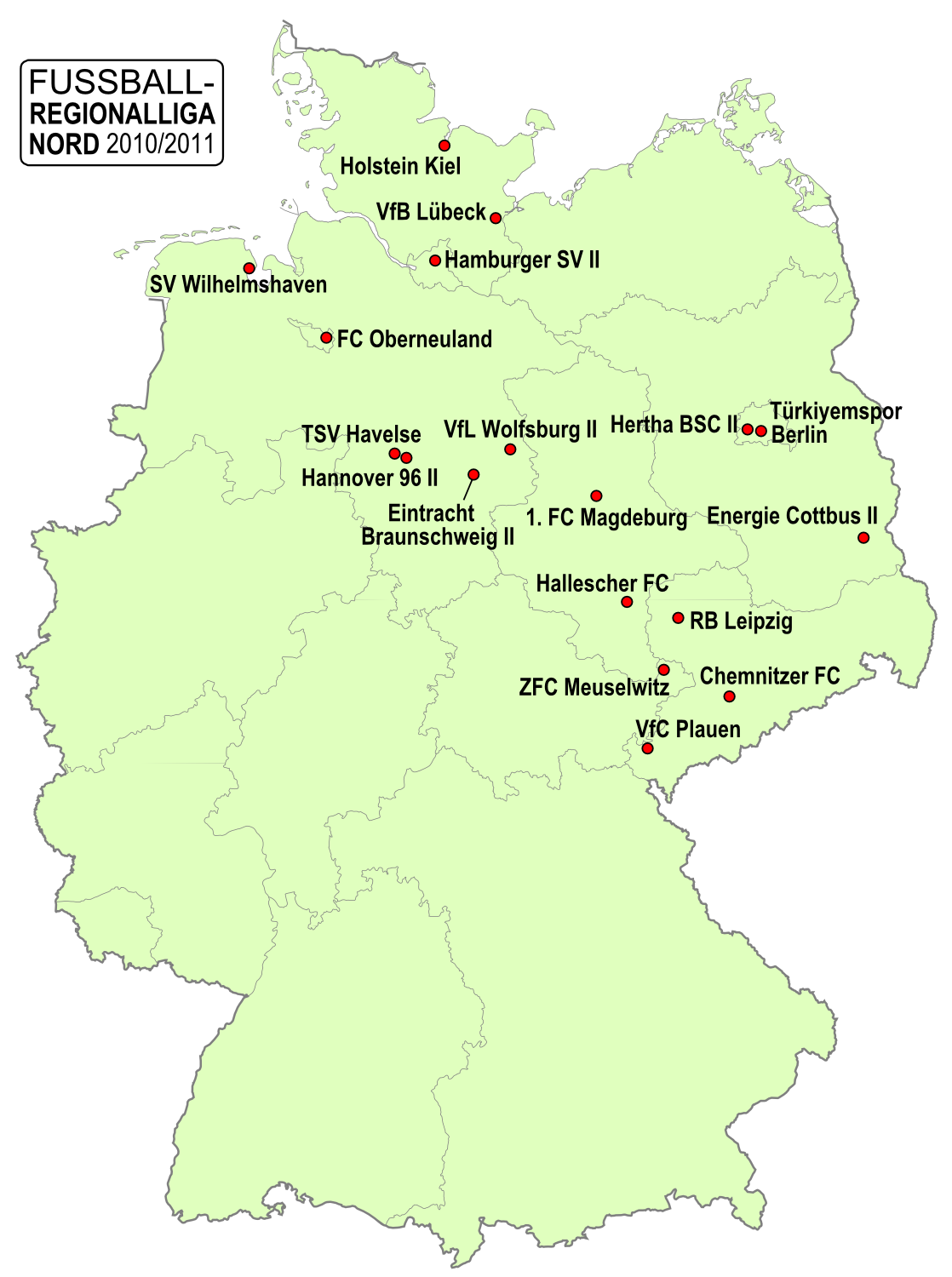 Karte der Vereine der Fußball-Regionalliga Nord, Saison 2010/2011